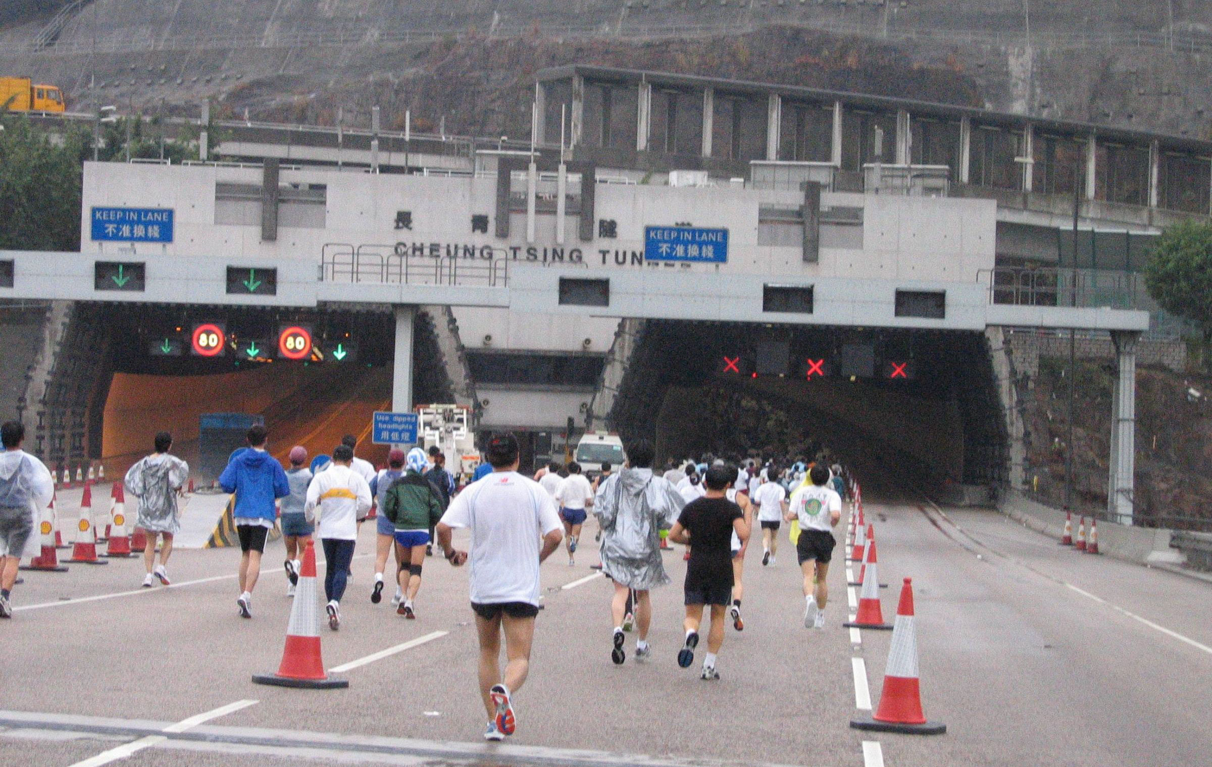 By me User:NLLMK 長青公路長青隧道